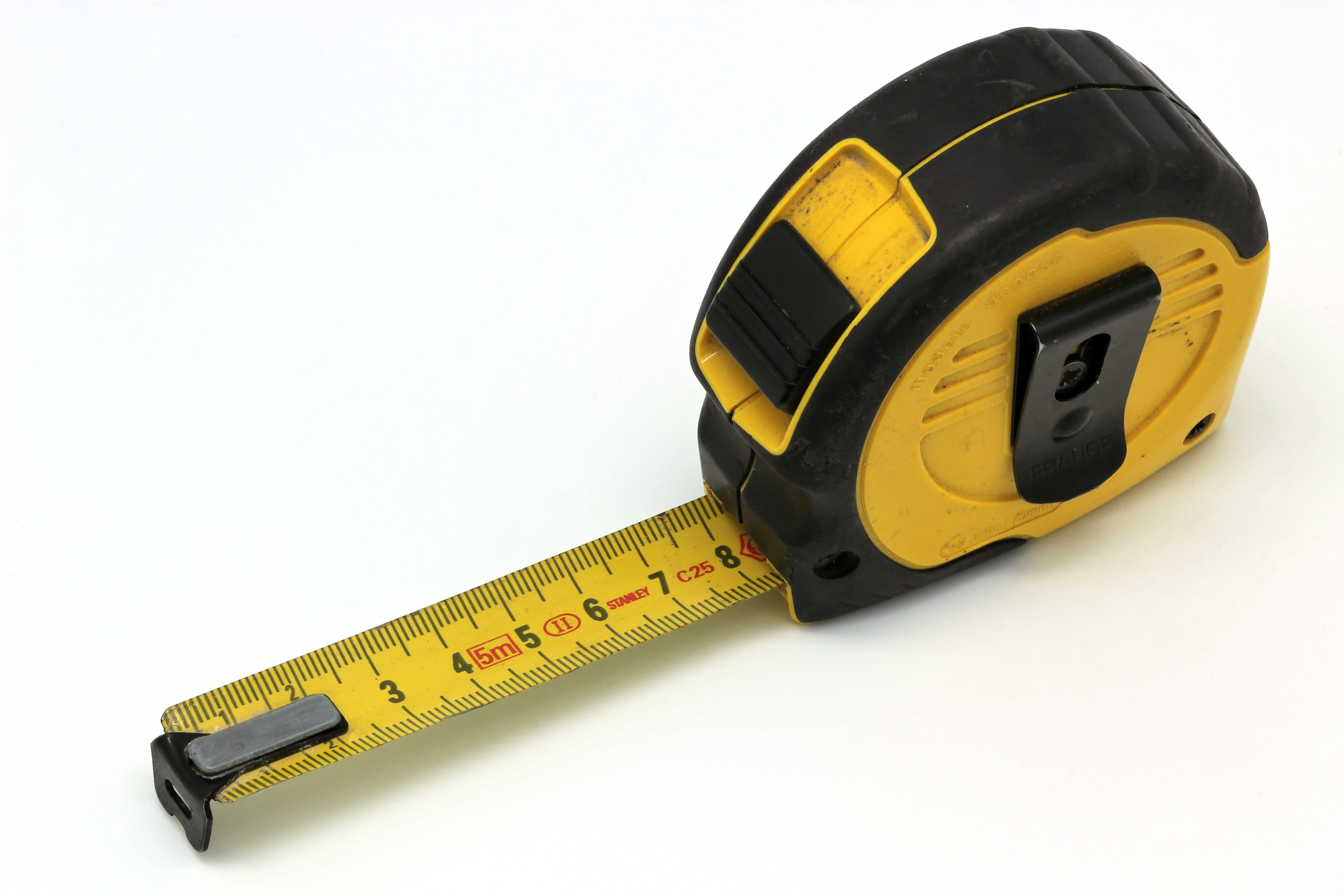 Stanley dynagrip 5 m × 19 mm 33-684.